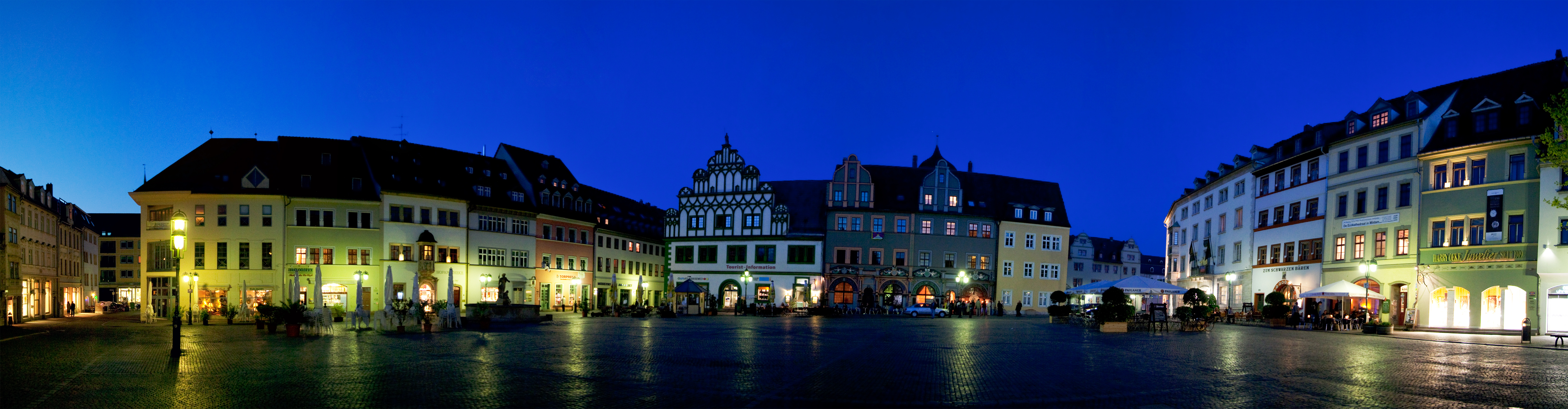 Marktplatz in Weimar 50°58′45.7″N 11°19′47.3″E / 50.979361°N 11.329806°E